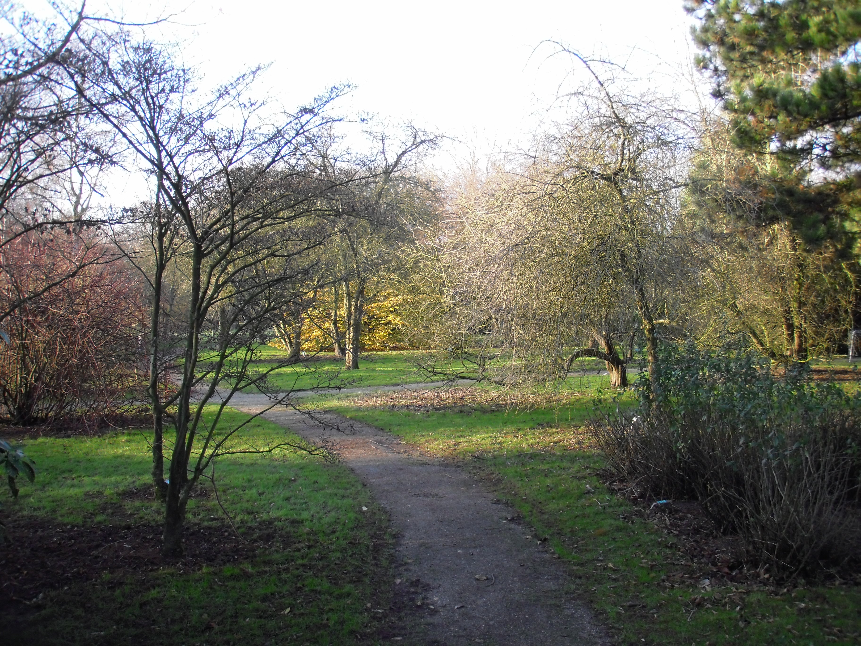 Aboretum Heempark - Delft - 2009